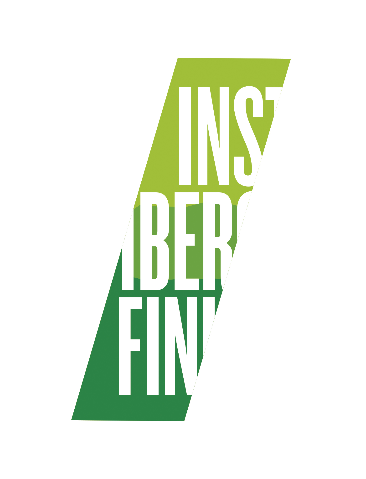 Suomen Madridin-instituutti